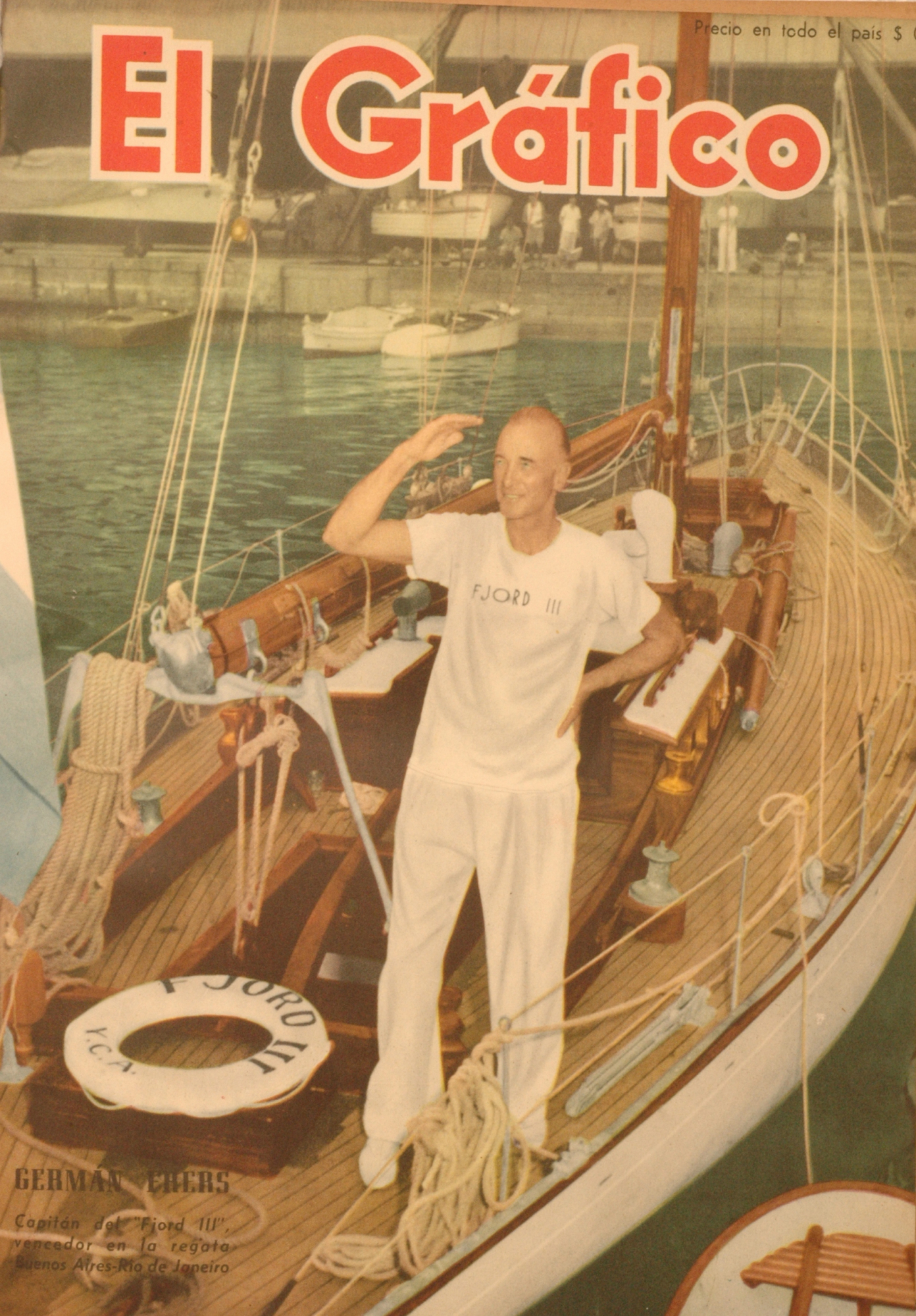 El Grafico del 03 de Marzo de 1950. Edicion 1595